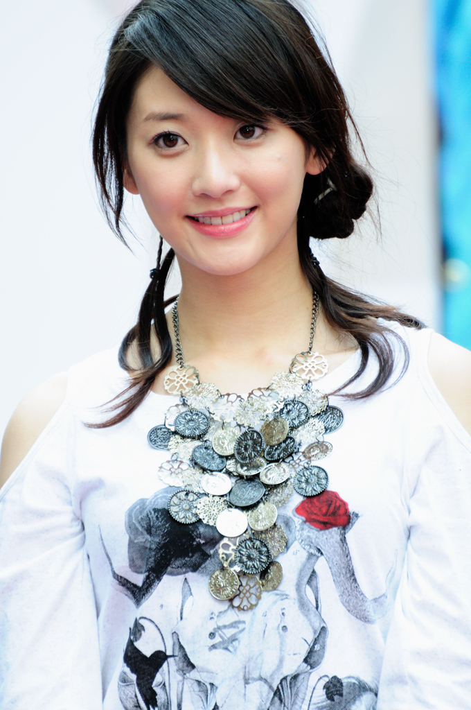 林逸欣